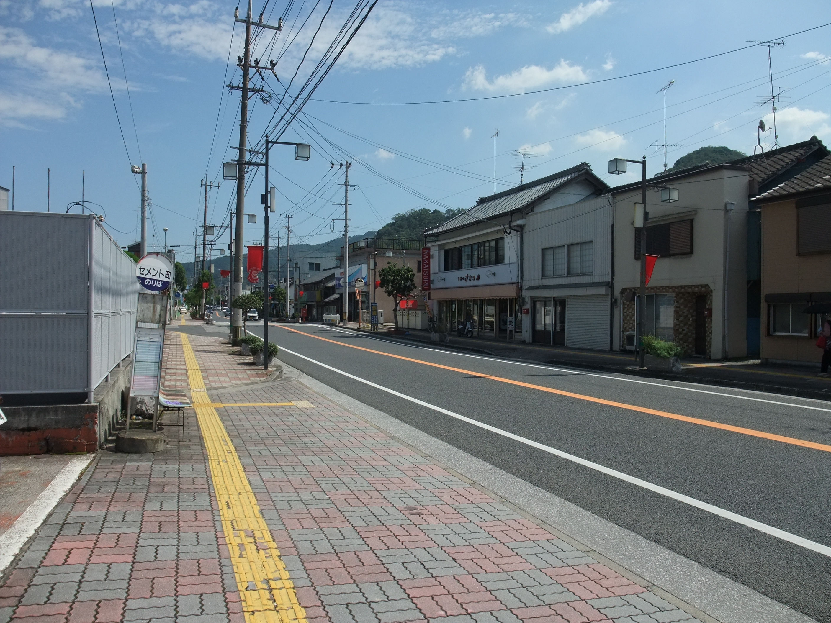 津久見市セメント町